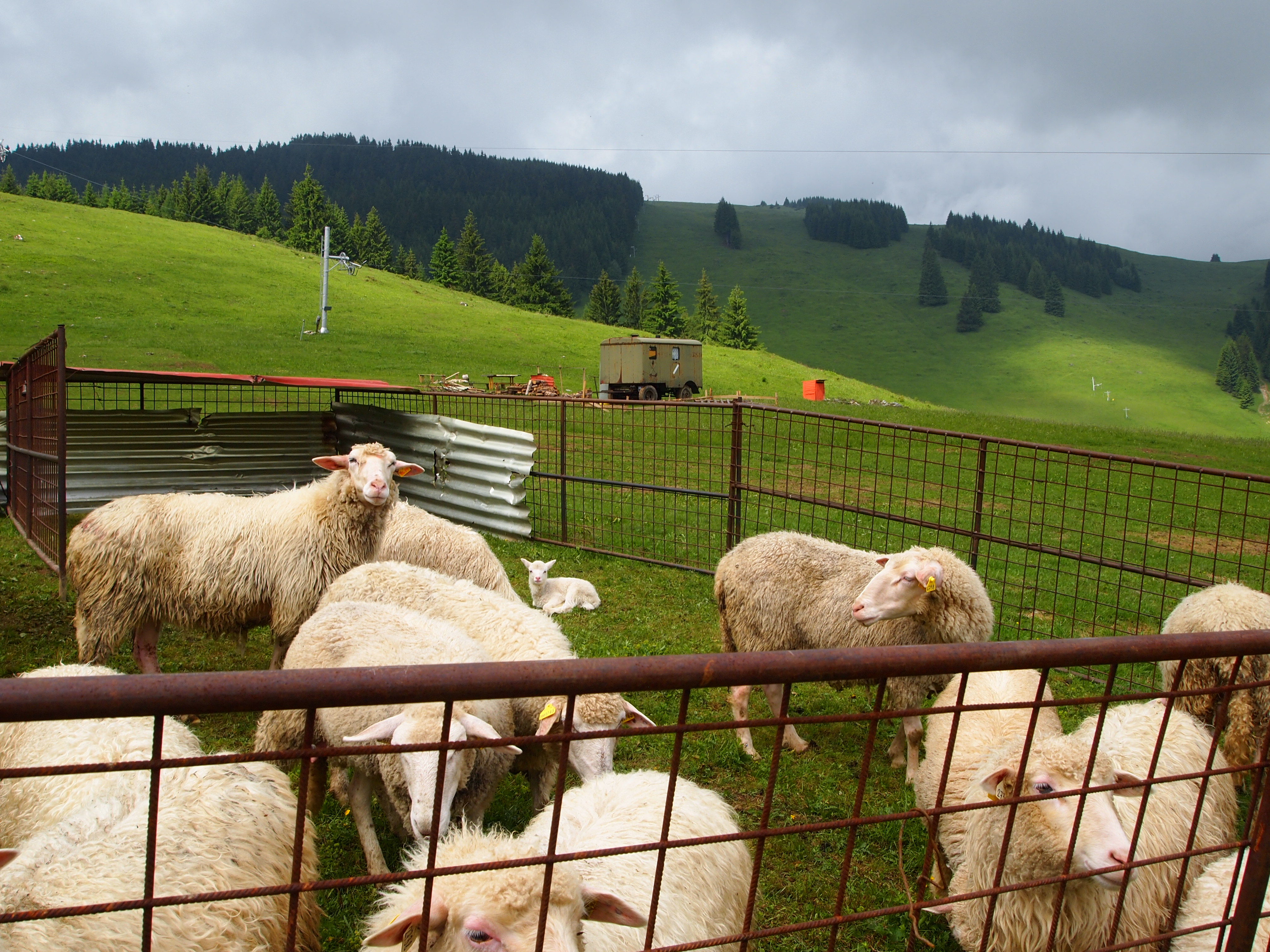 Súčasný košiar pri salaši v Liptovskej Tepličke, Slovensko.